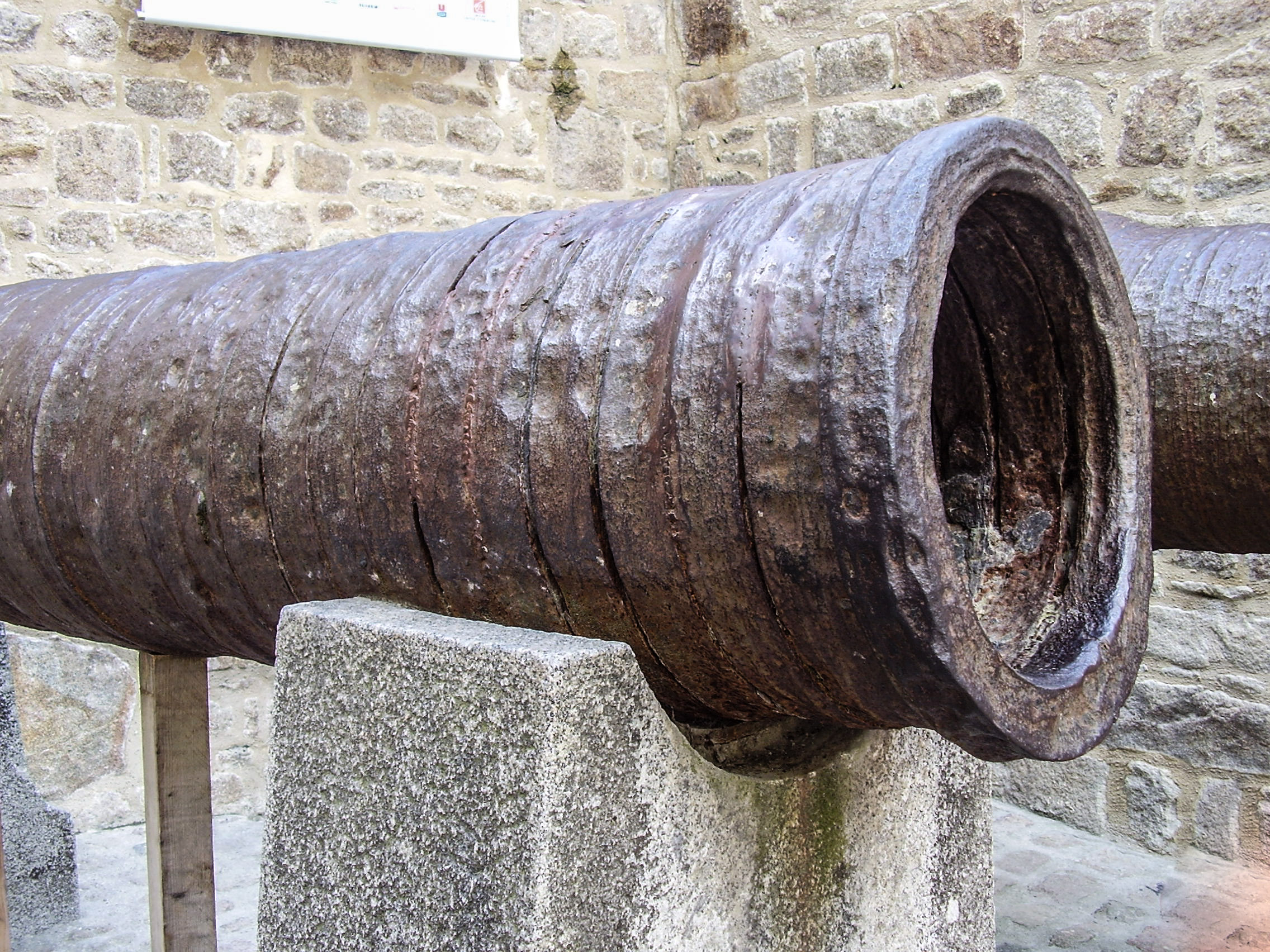 Mont Saint-Michel; Frankreich